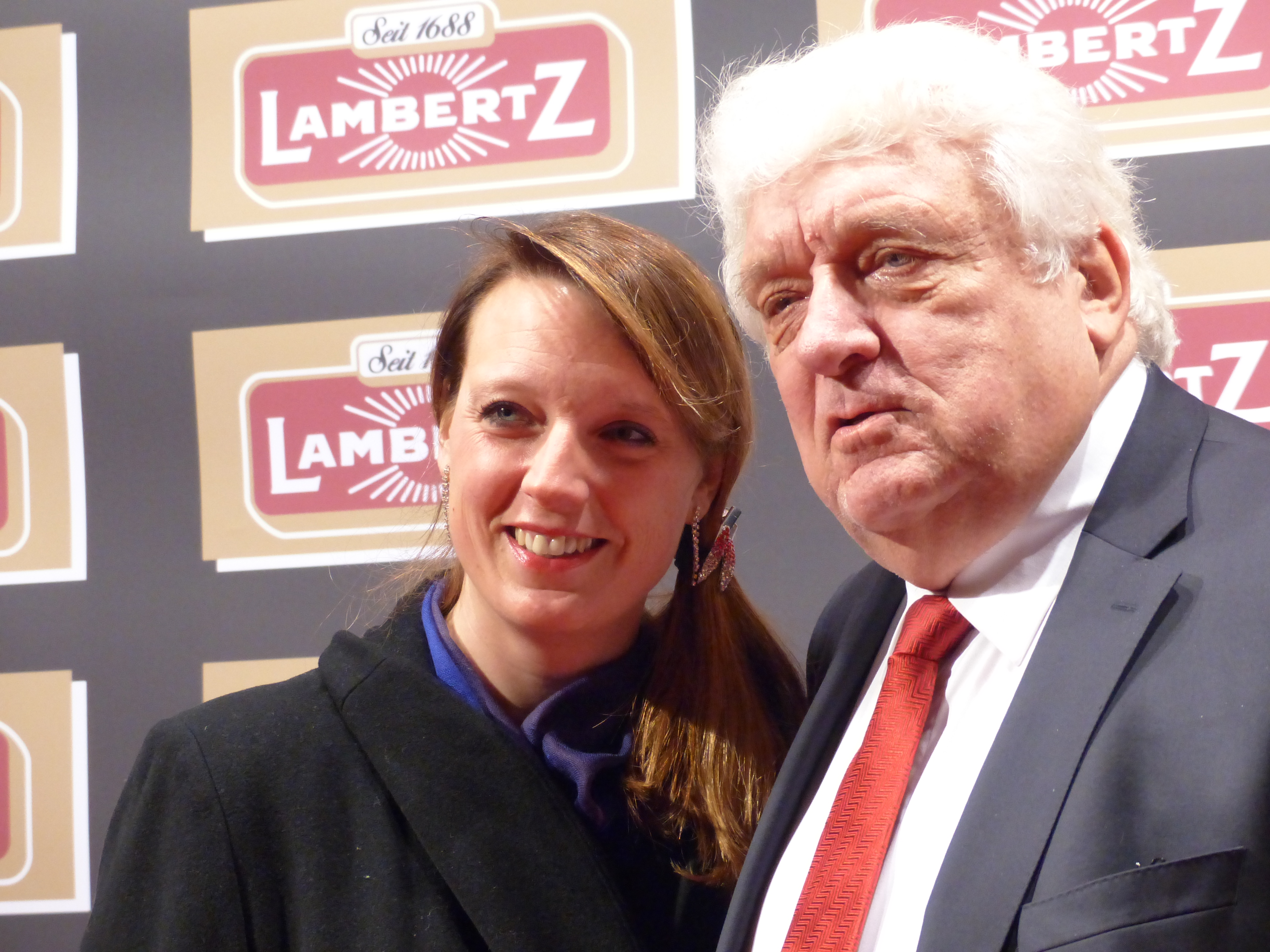 Hans Meiser mit Tochter Anouk Meiser bei der Lambertz Monday Night, im Februar 2016.